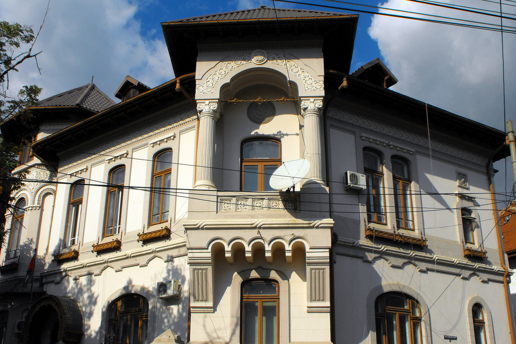 Dumbrava Rosie 1